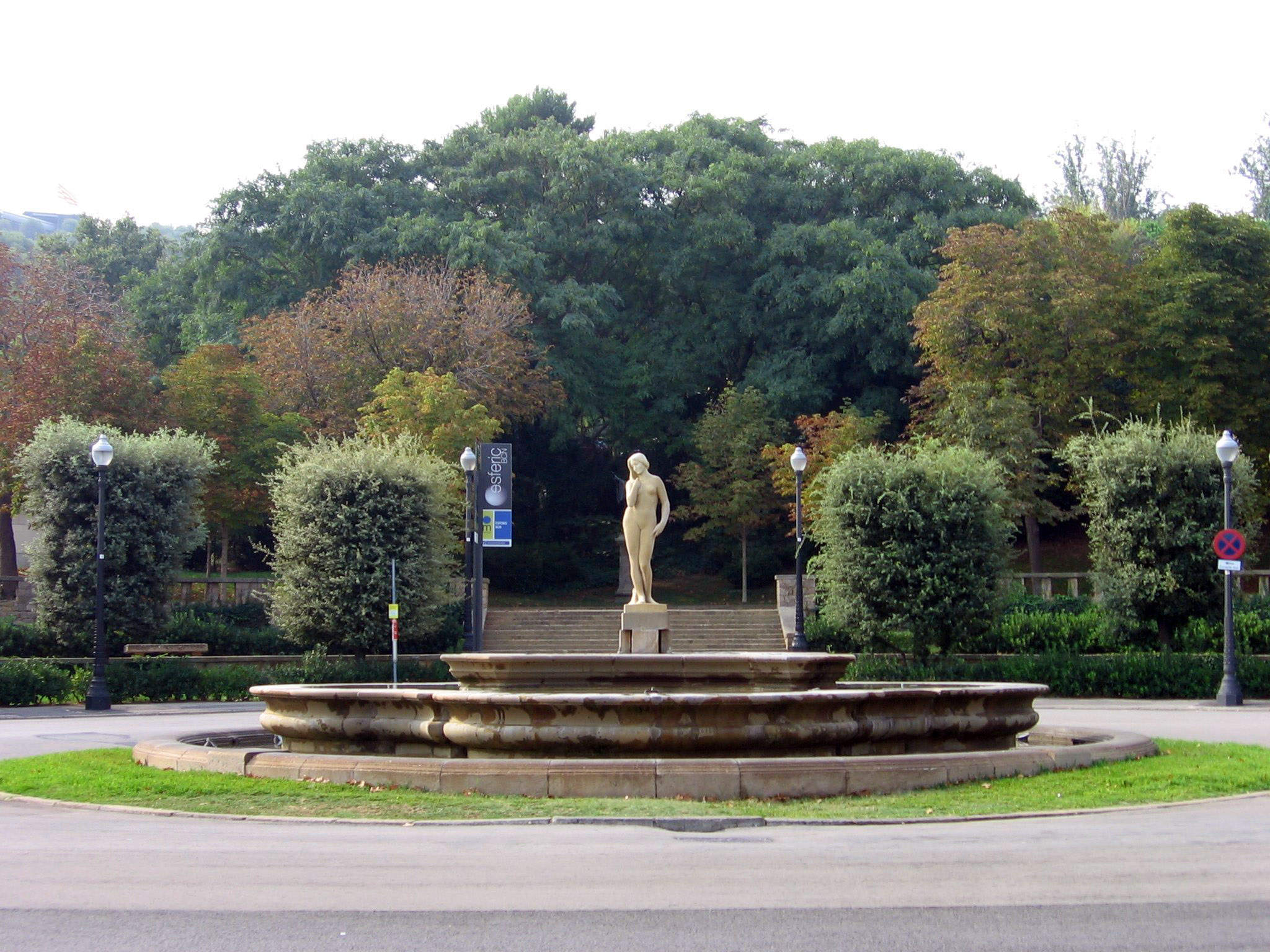 Entrada a los Jardines de Joan Brossa, con la escultura Belleza, de Josep Llimona.